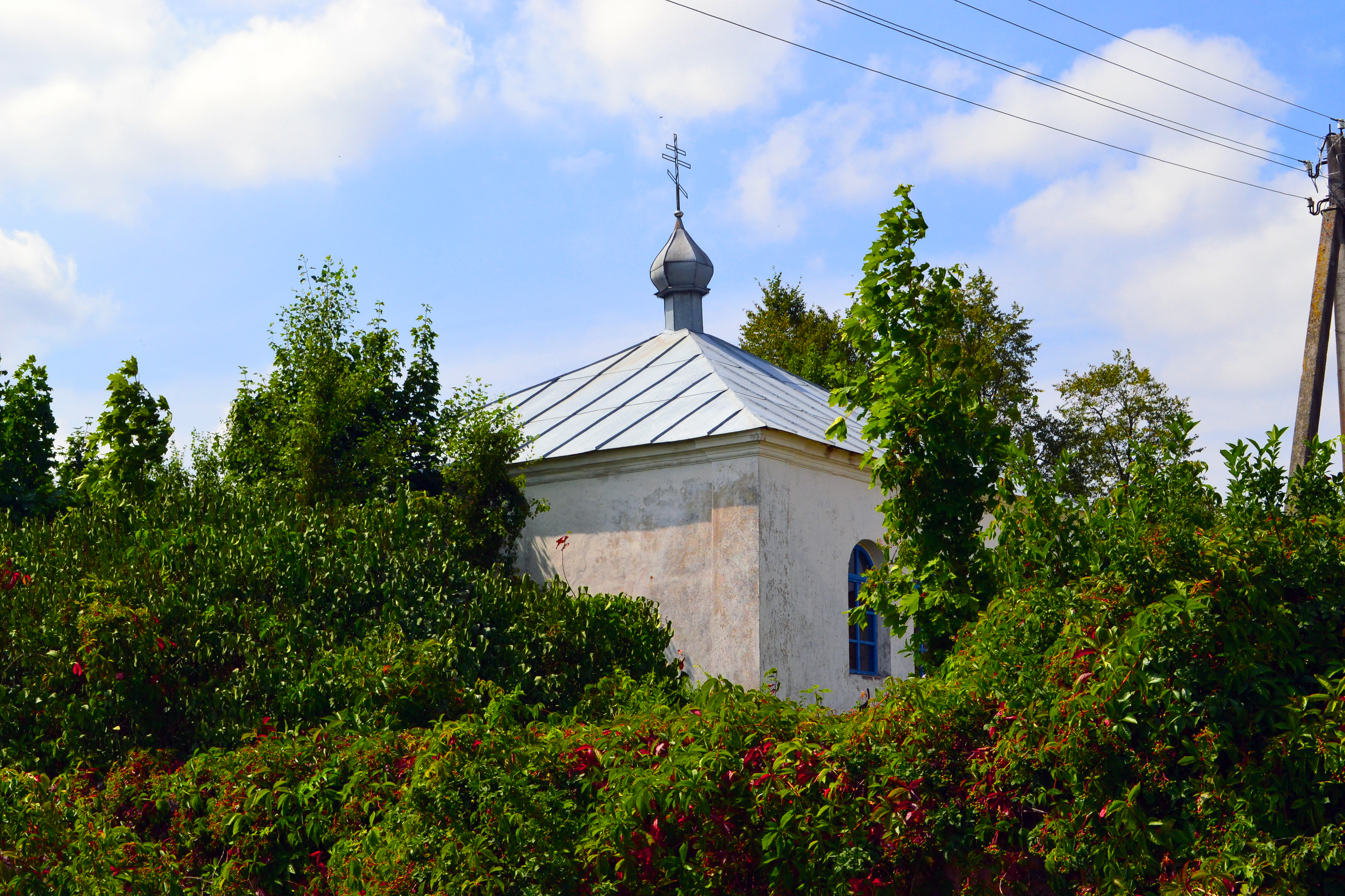 Беларуская (тарашкевіца): Крыжаўзьвіжанская царква ў Зельзіне (Пружанскі раён). This is a photo of Belarusian heritage monument. Reference number: 113Г000609 ( WLM)